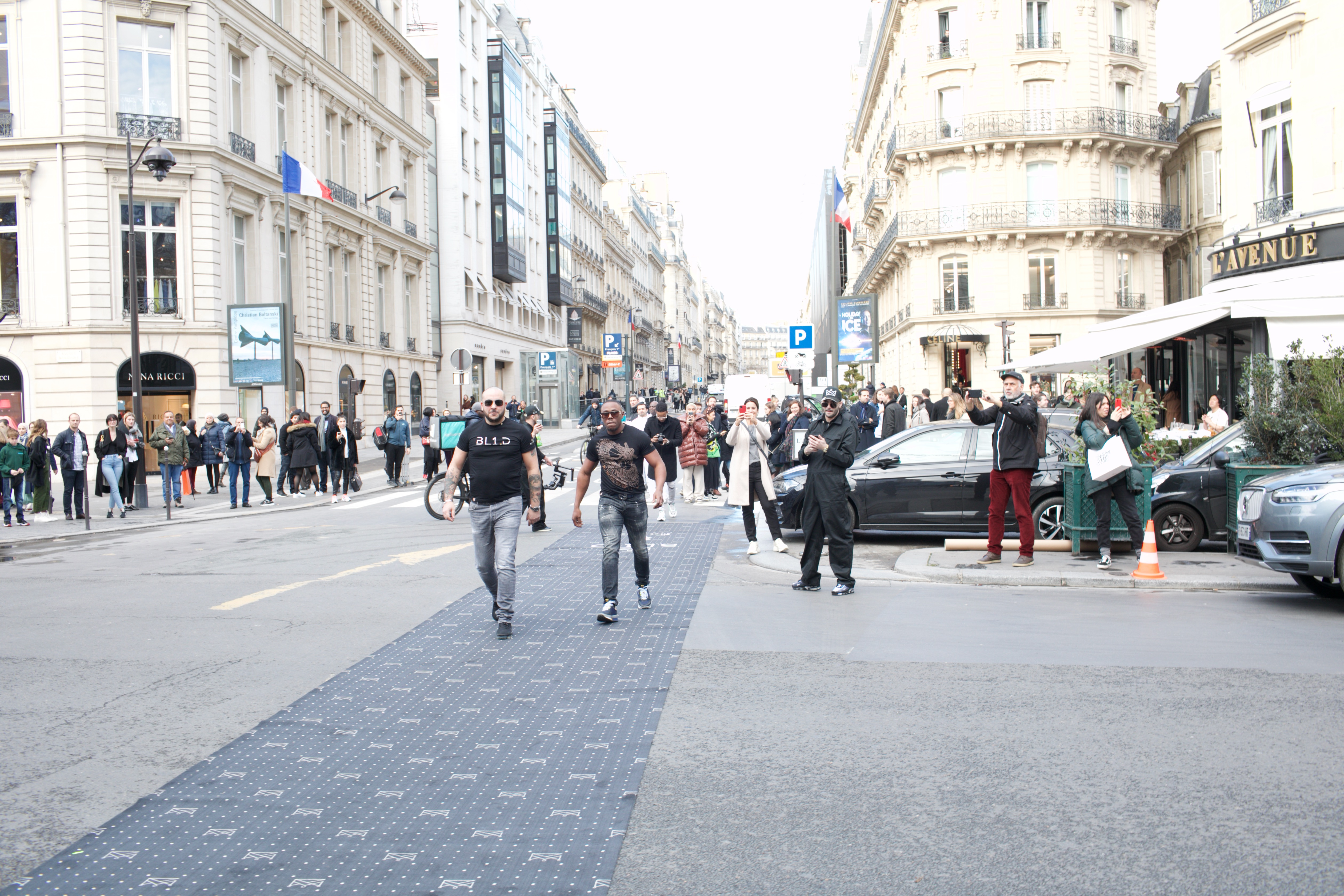 Défilé BL1.D, avenue Montaigne, durant la Fashion Week homme automne-hiver 2020